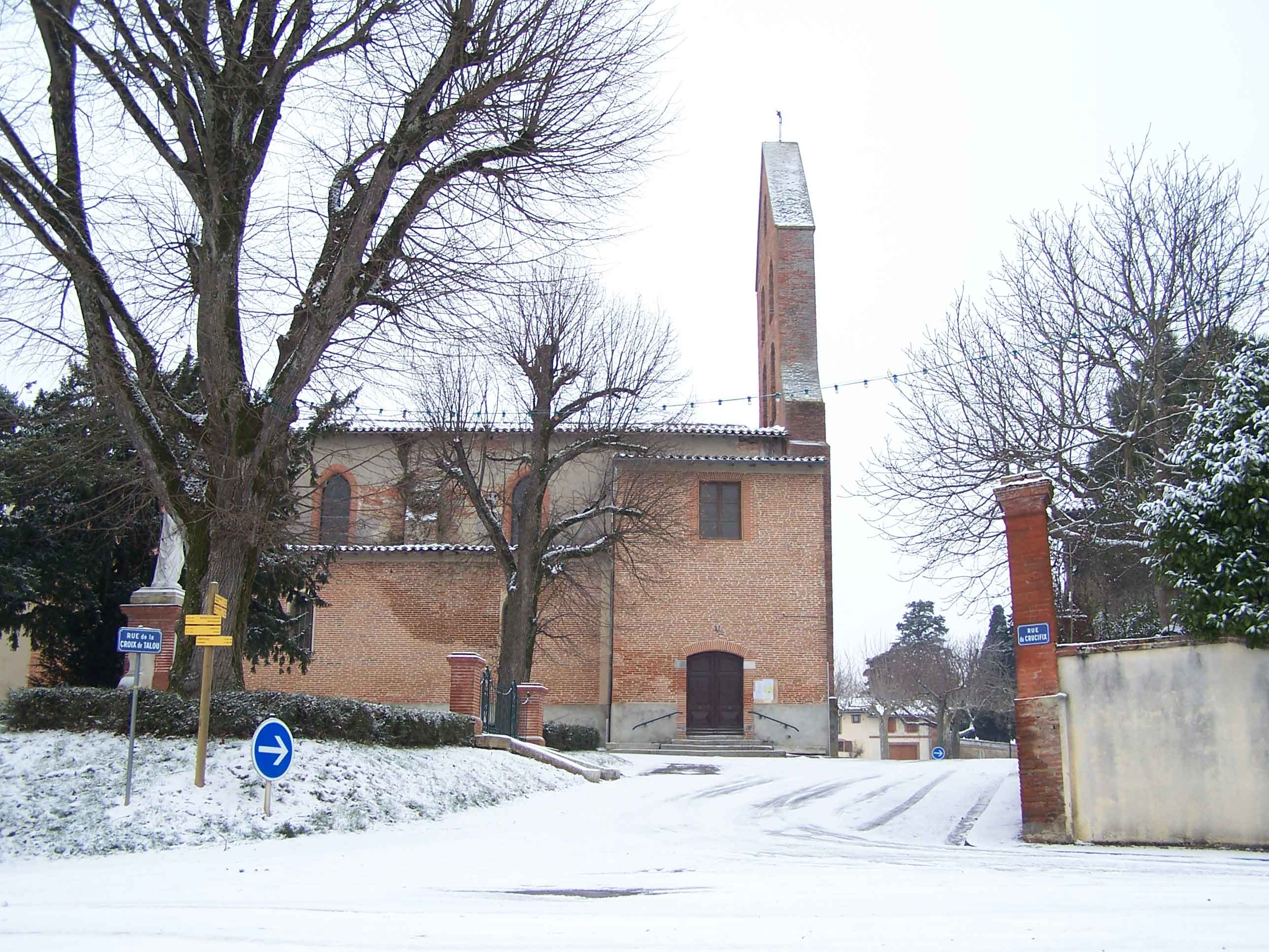 l'église de Deyme sous la neige le 18 janvier 2009